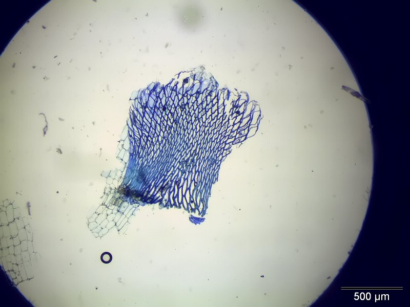 Sphagnum fimbriatum, Stammblatt, 40x